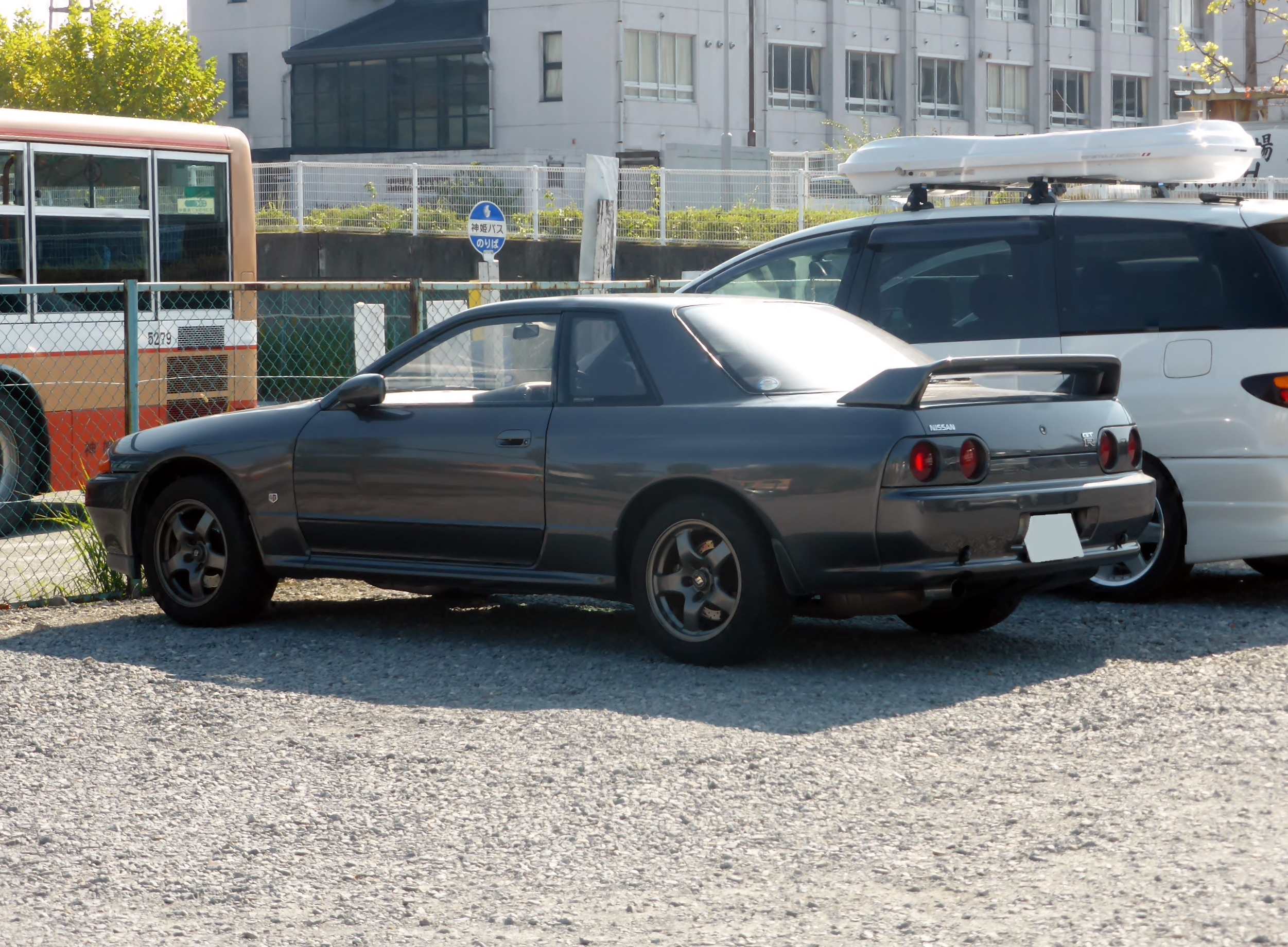 BNR32型日産・スカイラインGT-Rをリアから撮影。